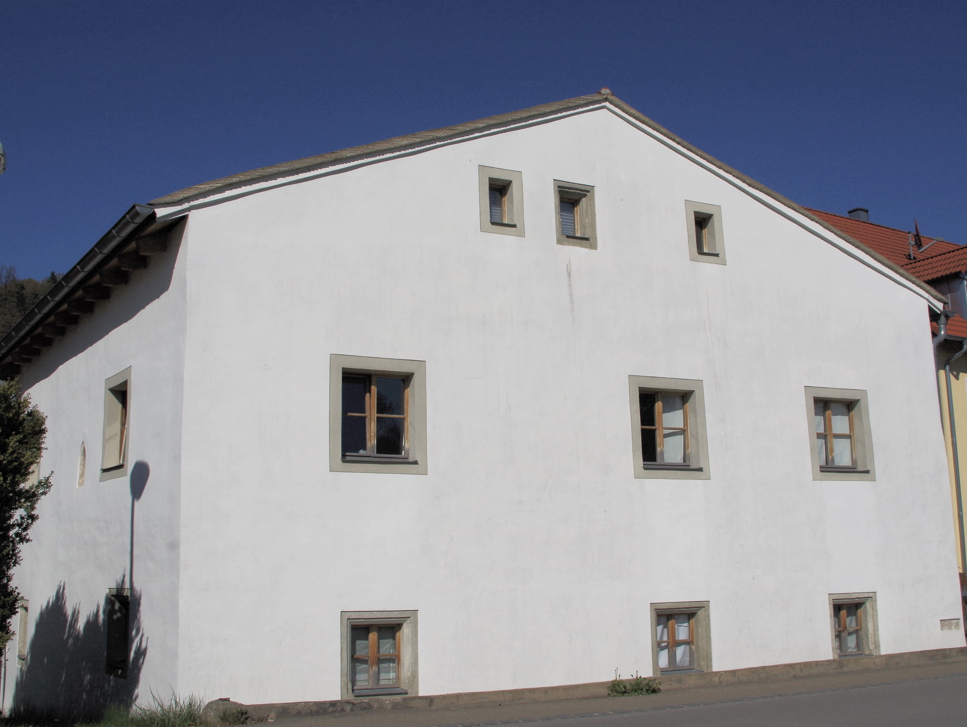 Donaustr.52 - Oberndorf